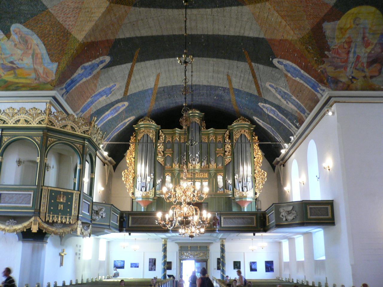 Oslo domkirke, innvendig